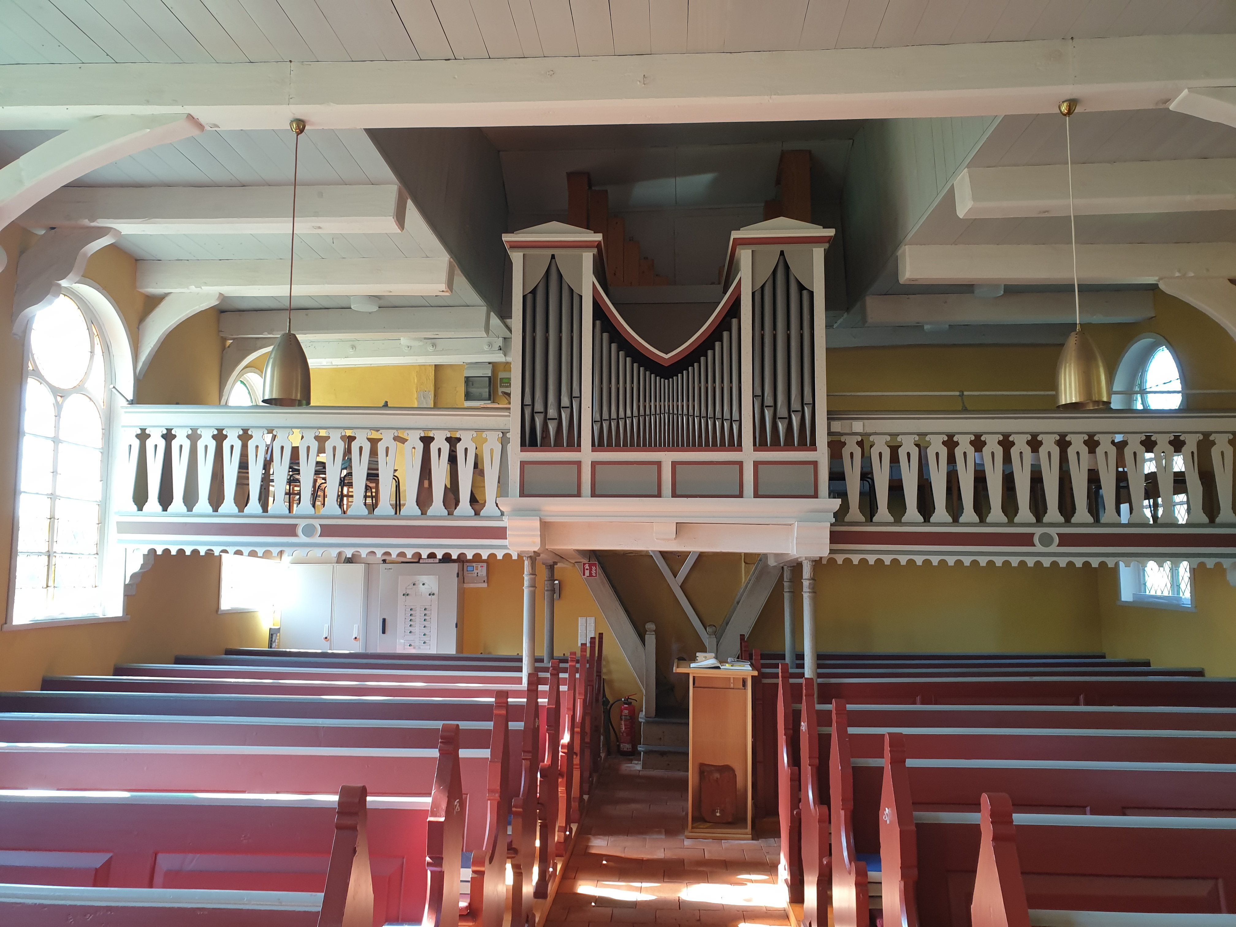 Orgel in der Kirche Großenwörden, Landkreis Stade, Nds.